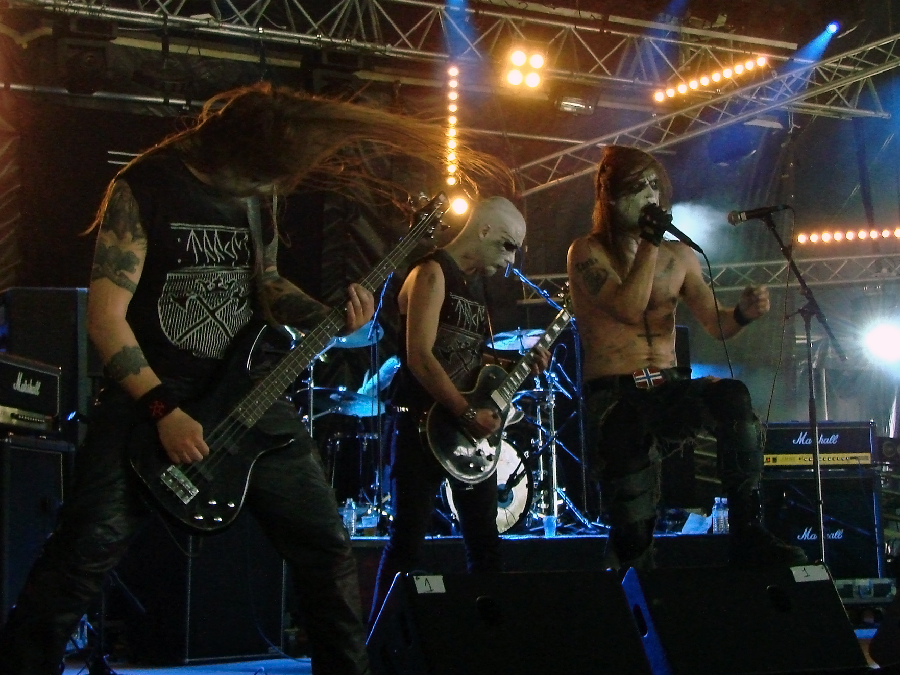 Taake au Hellfest 2009.